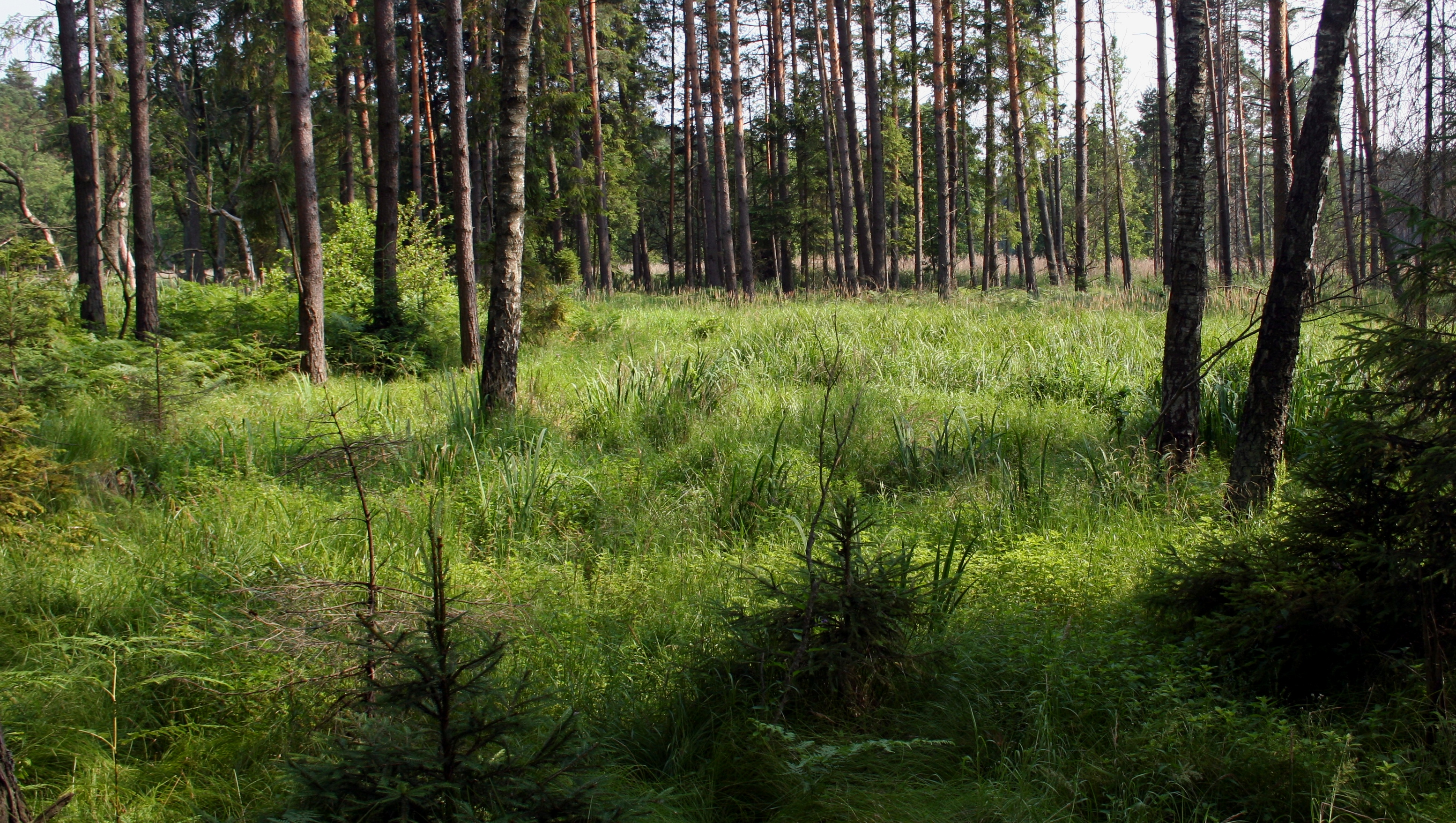 Zbiorowisko roślinne przy zalewie w Kaletach-Zielonej